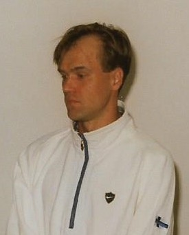 Valentin Kononen Suomen joukkueen mitalikahvitilaisuudessa yleisurheilun EM-kilpailuissa Budapestissa 23. elokuuta 1998.